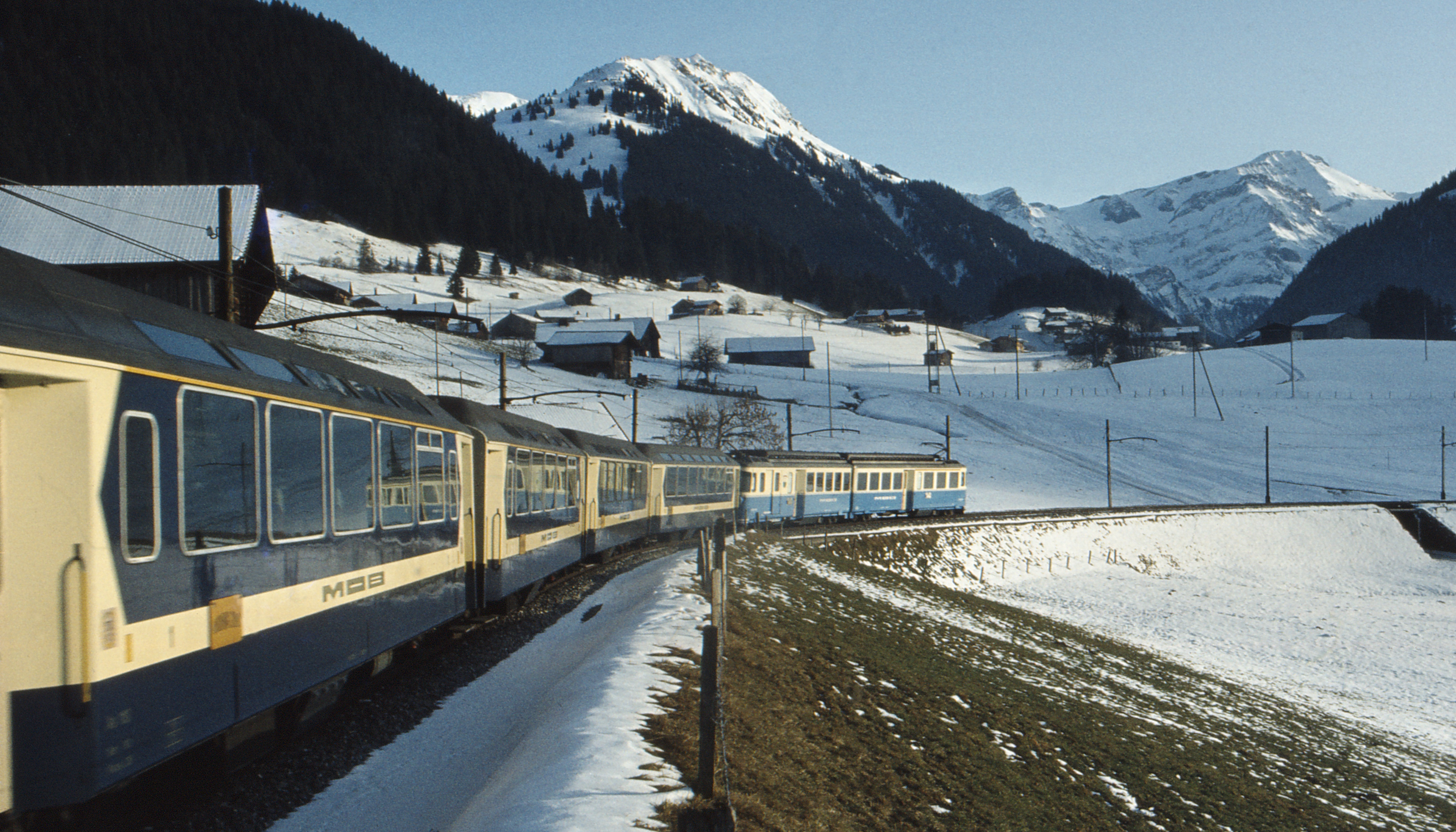 ABDe 8/8 MOB near Gstaad Switzerland